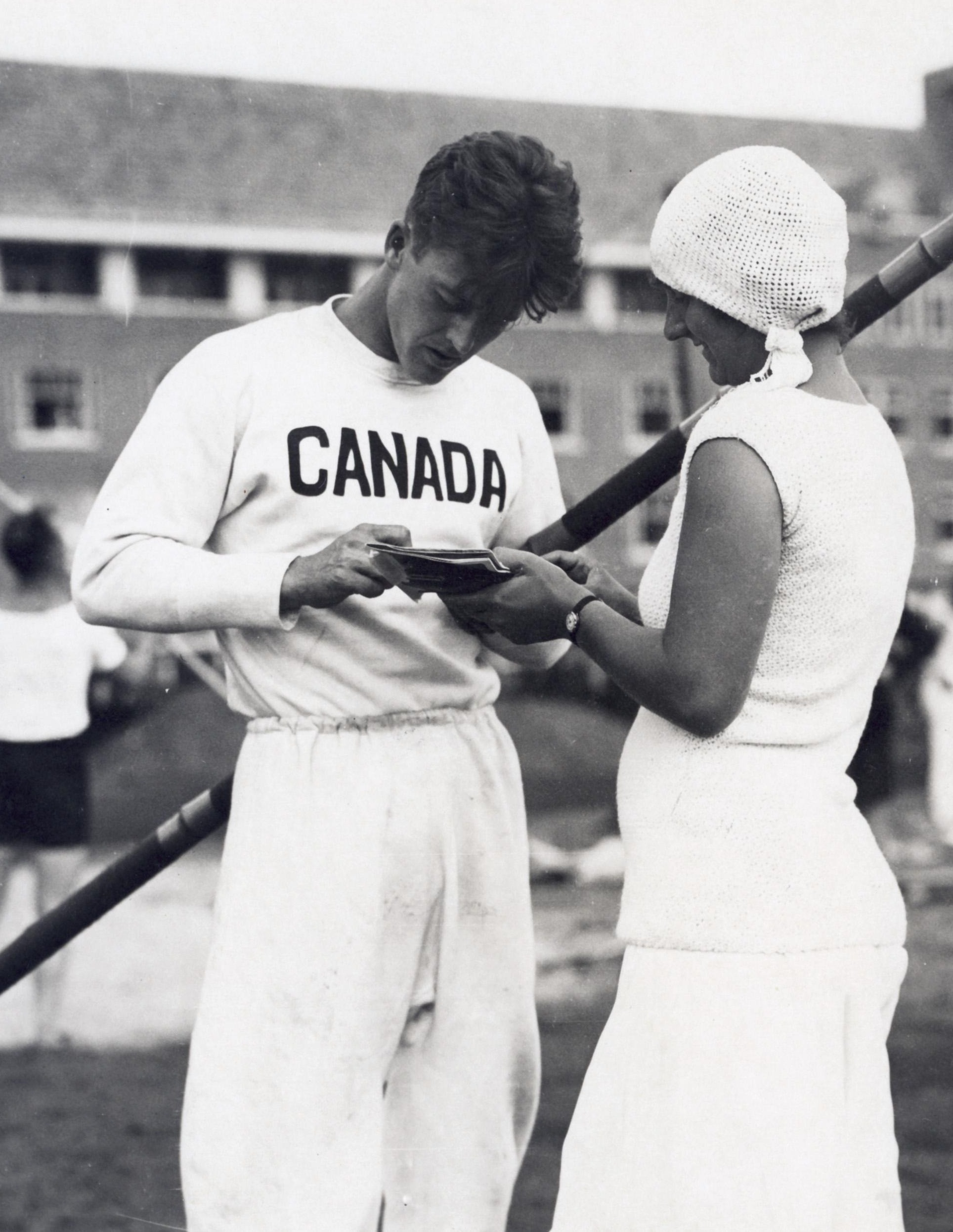 Sport, Olympische Spelen Amsterdam, 1928 : Een Canadese polstokhoogspringer deelt een handtekening uit aan een dame.